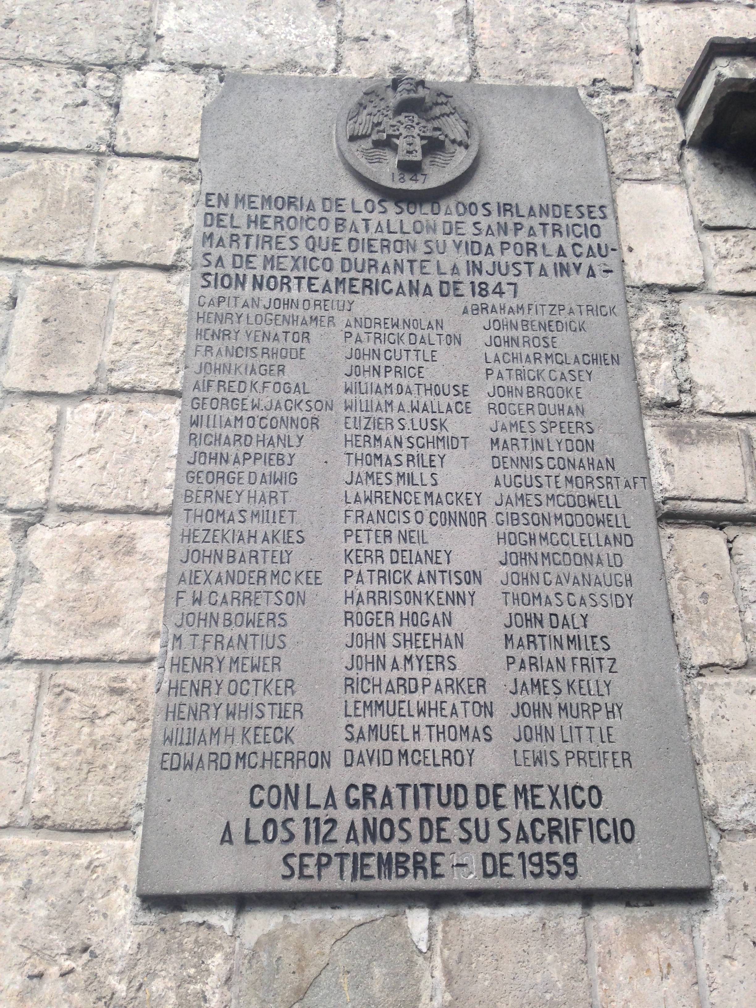 Foto tomada frente a la Plaza San Jacinto, lugar donde reside una placa que conmemora a aquellos soldados irlandeses que lucharon por la causa mexicana durante la Guerra de Intervención Norteamericana, inmortalizando su heroica hazaña y devoción por un país como México y su desacuerdo con la causa norteamericana.